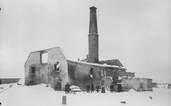 Karitsa mõisa viinavabrik pärast 1905.a põletamist.